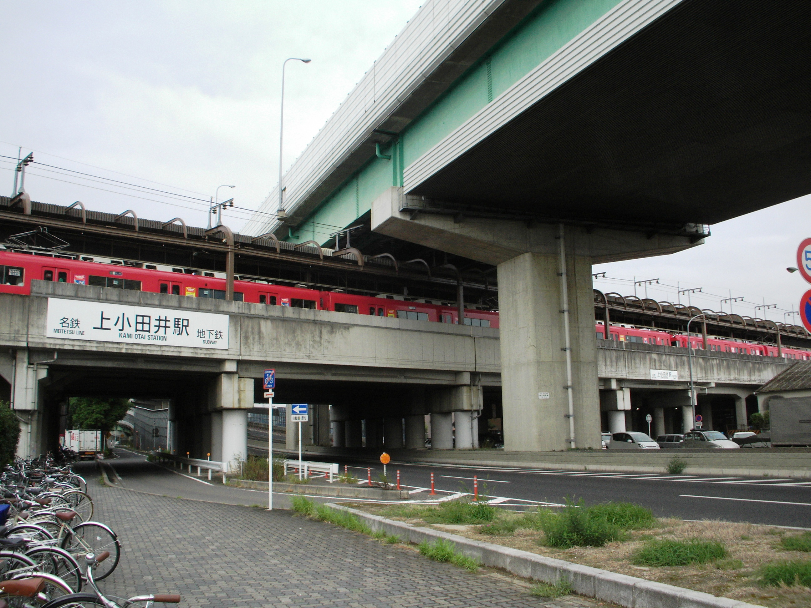 上小田井駅